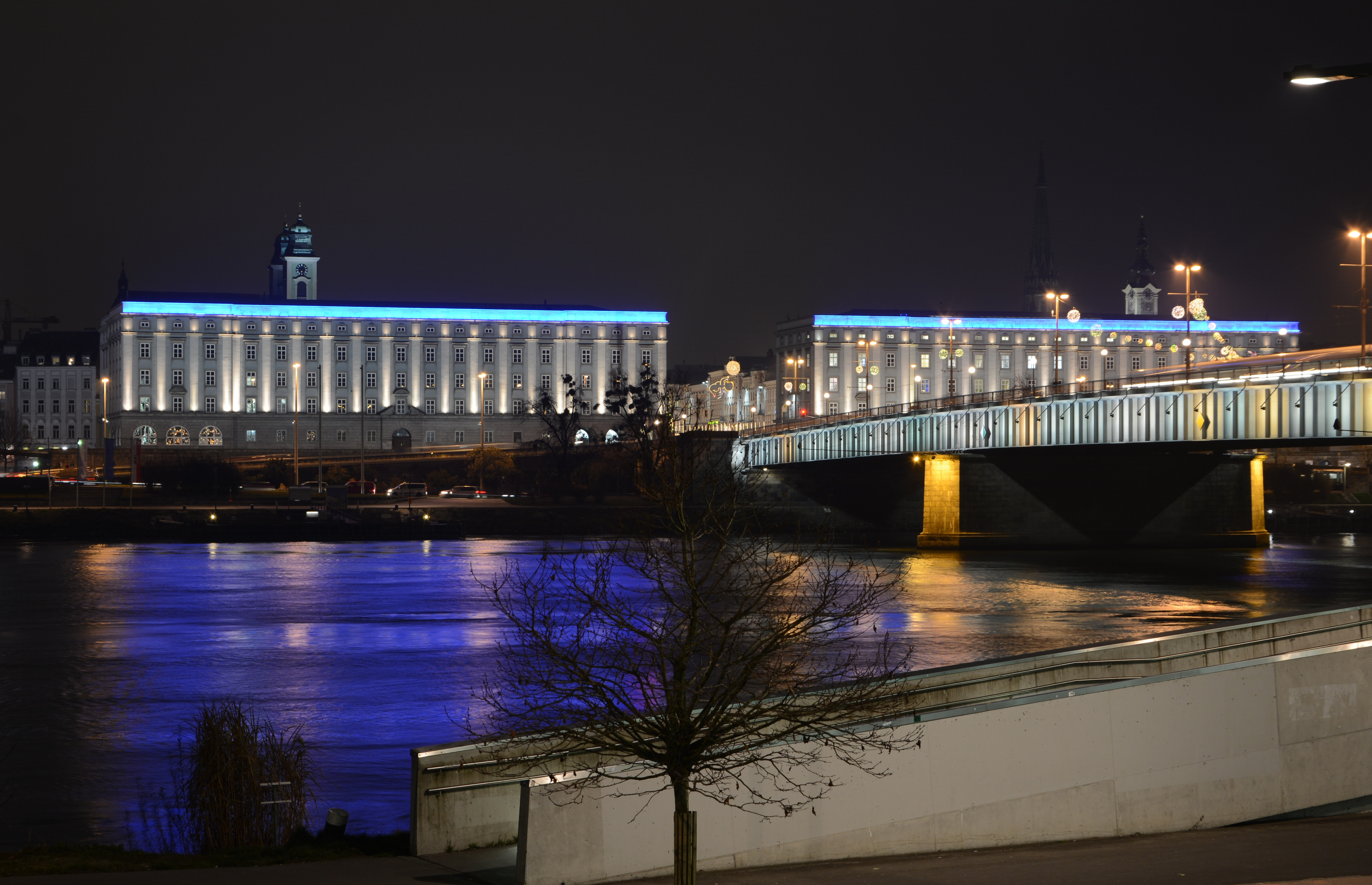 Brückenkopfgebäude Ost, ehem. Finanzamt